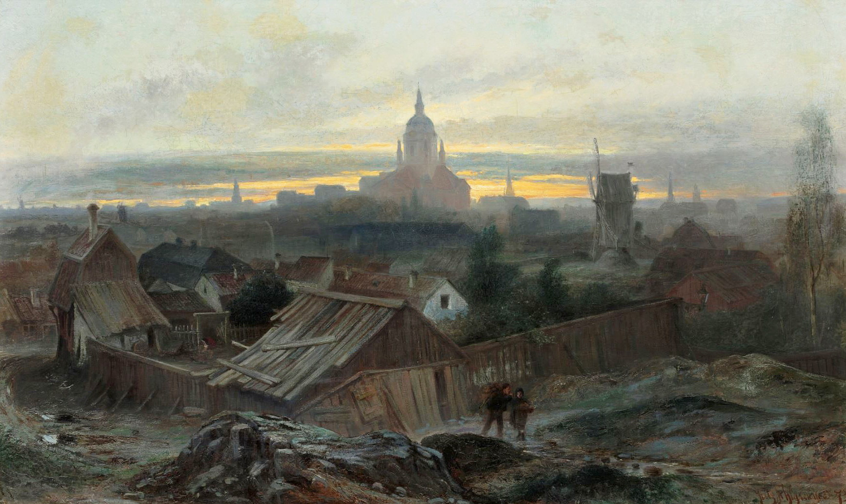 Utsikt från Vita bergen med kvarnen Tjärbeljan och Katarina Kyrka i fonden (utsnitt)